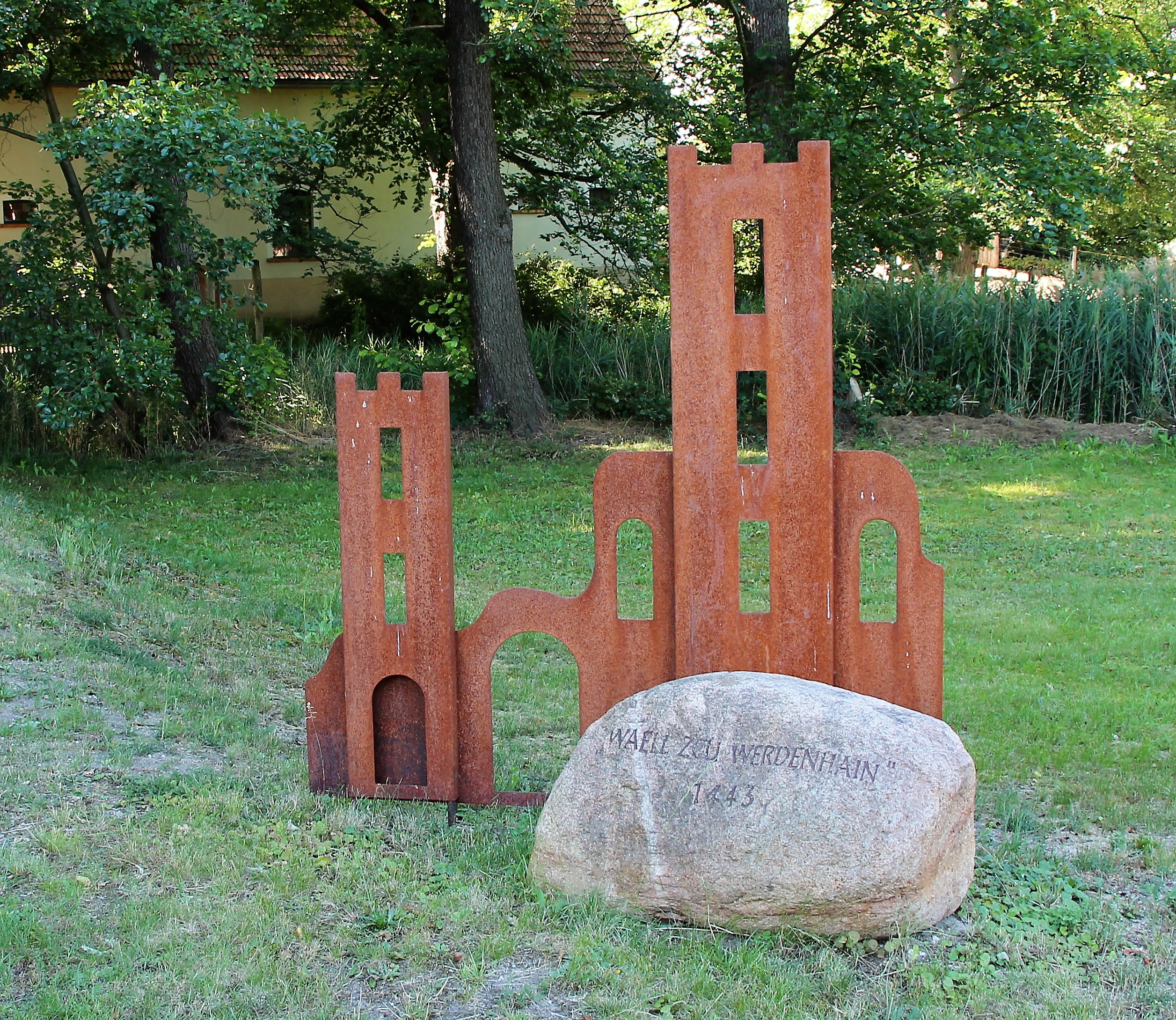 Im Jahre 1998 vom Bad Liebenwerdaer Verein „AG Heimatkunde“ aufgestellter Gedenkstein an das Schloss Würdenhain in Würdenhain.